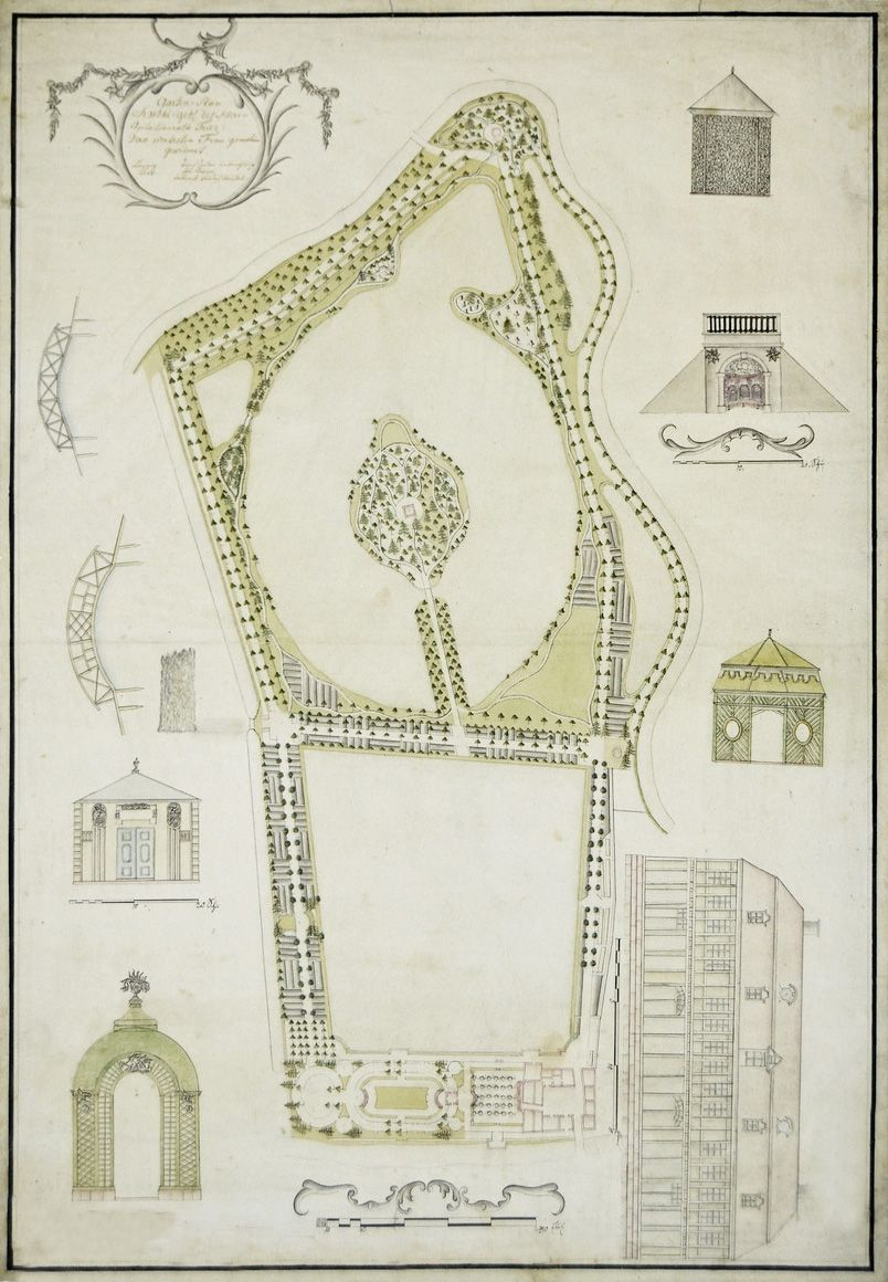 Plan des Trierschen Gartens in Leipzig